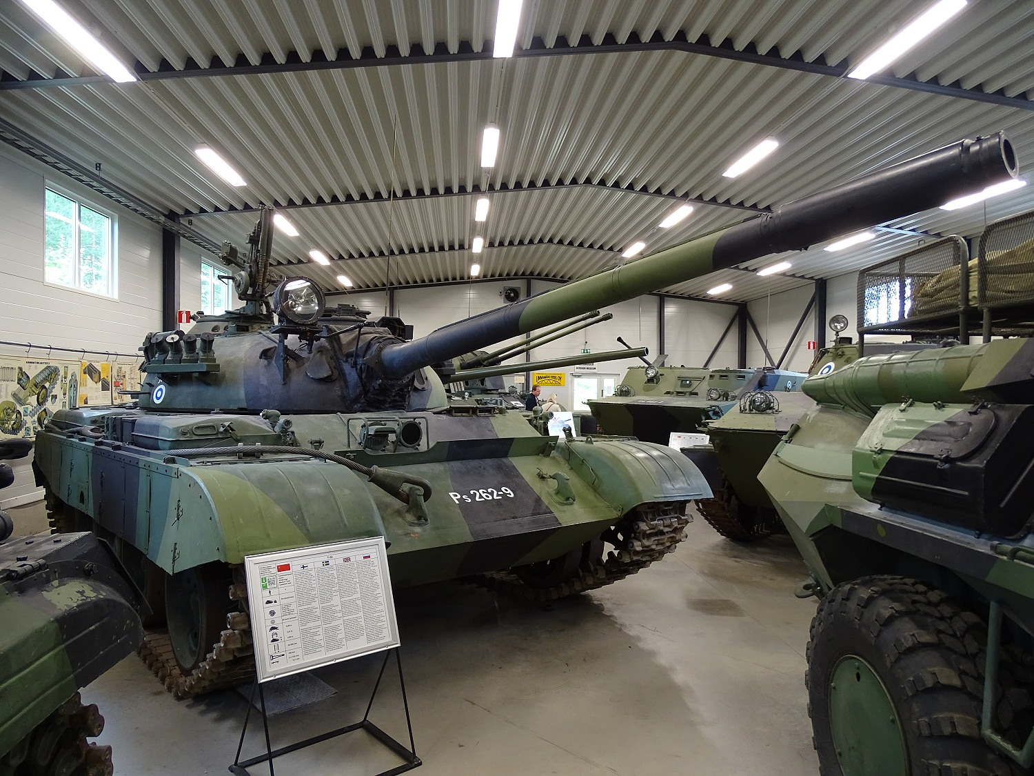 072 - T-55